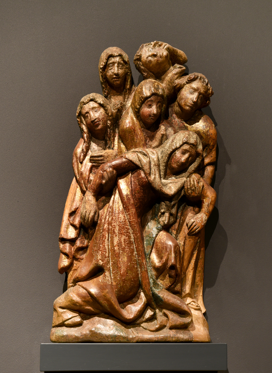 Fragment skupiny Ukřižování (kolem r. 1400), GVU Cheb